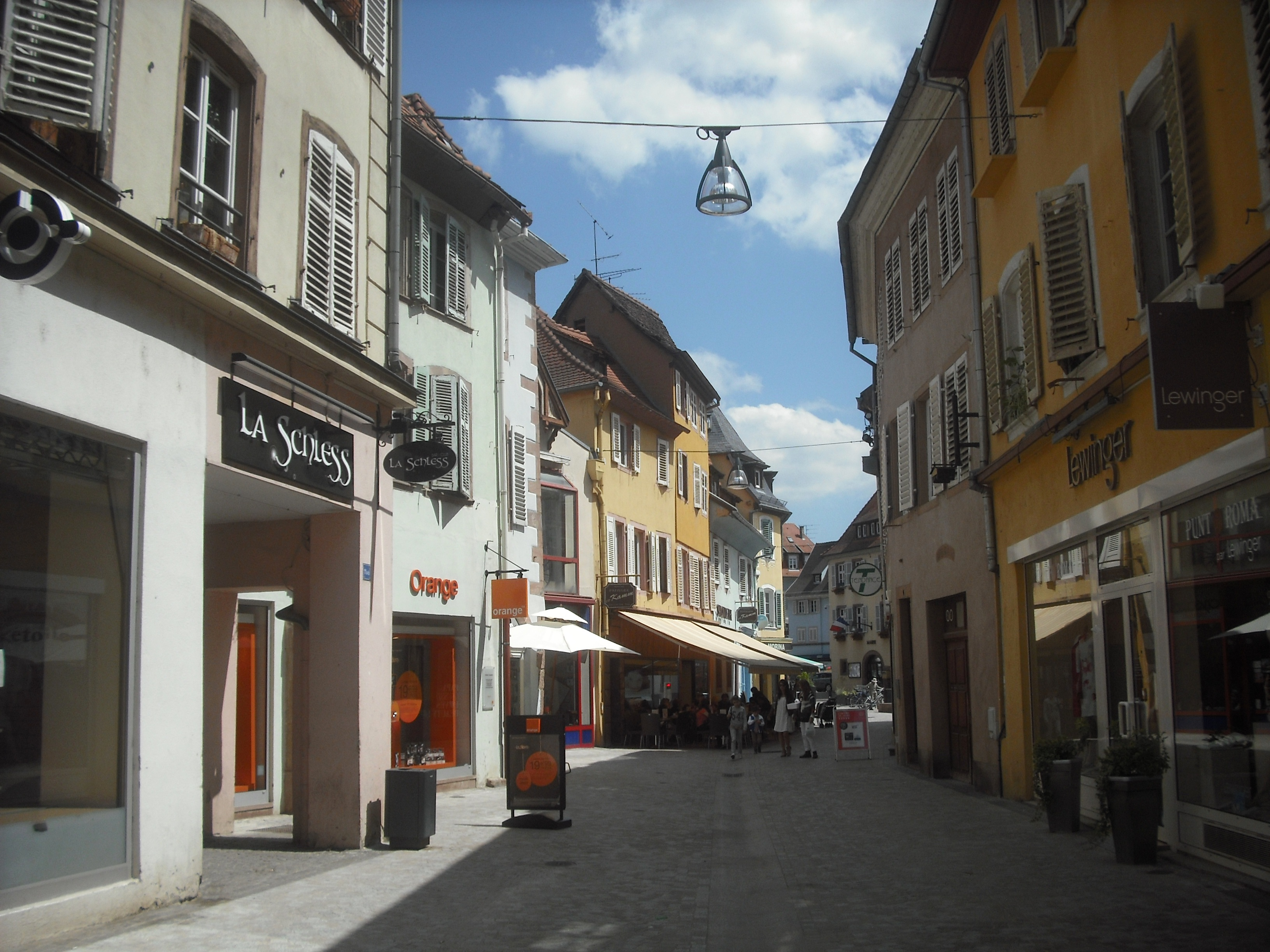 Rue des Clefs, Sélestat, Bas-Rhin, France.